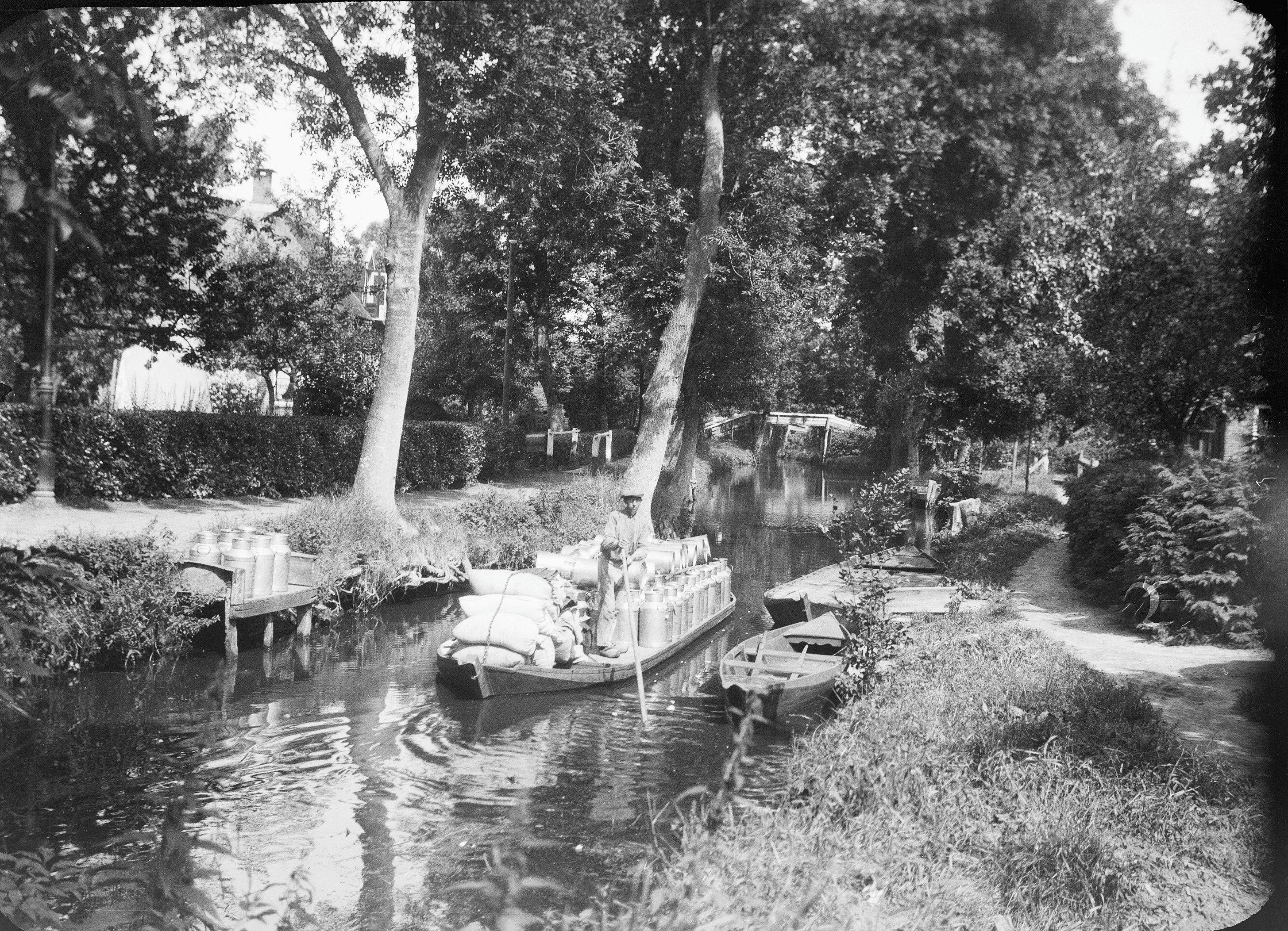 Diversen: Dorpsgezicht